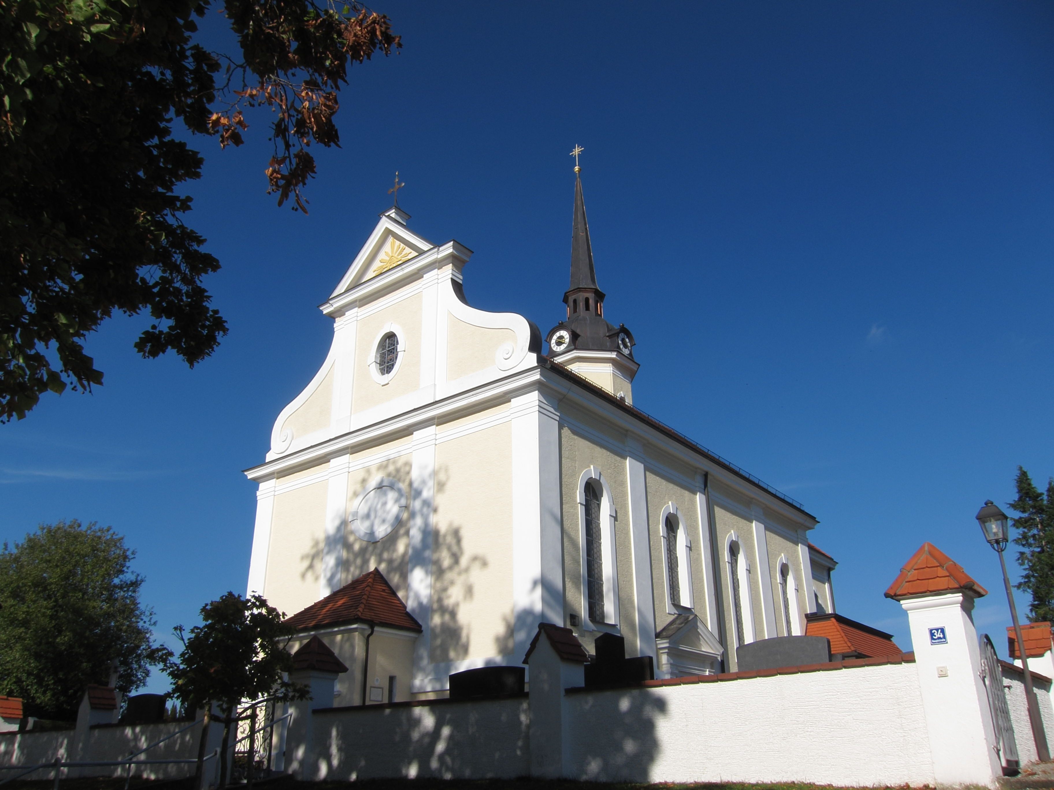 Inning am Holz; katholische Pfarrkirche St. Stephanus, Saalbau mit Schweifgiebel und Chorflankenturm in neobarockem Stil, Neubau von 1903/04; mit Ausstattung.